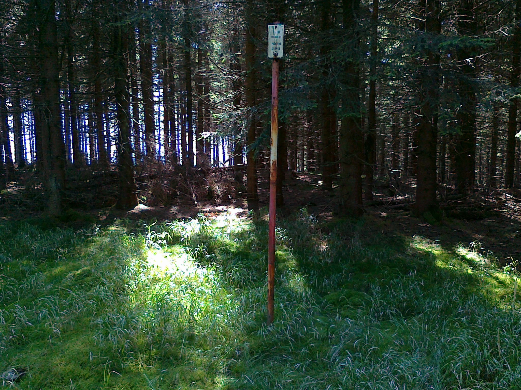 Punkt geodezyjny na szczycie góry Lysý vrch - 1128 m n.p.m.